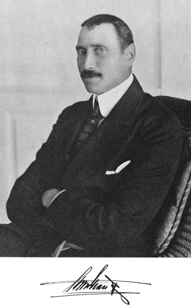 Christian 10. (1870-1947), Dansk konge fra 1912 til sin død.